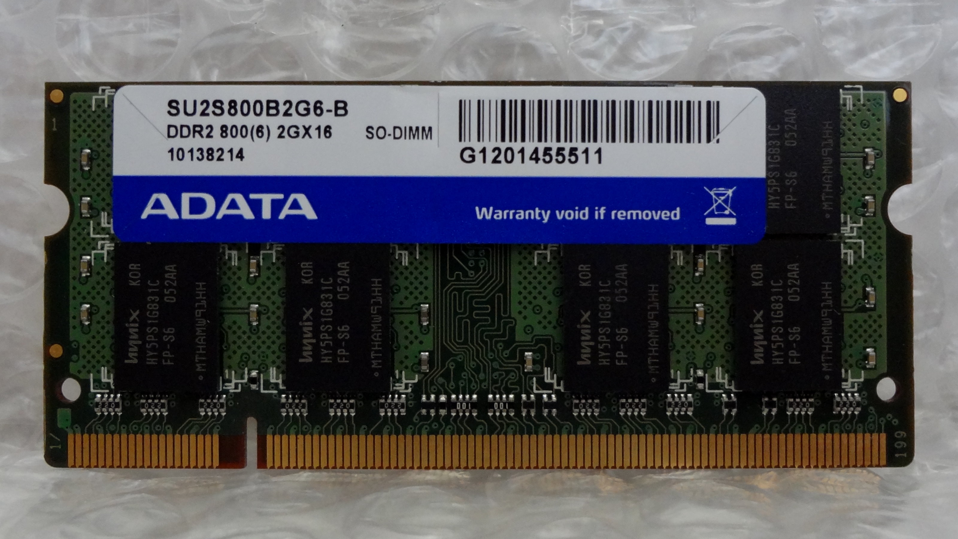 中文（台灣）: 威剛科技2GB DDR2 800 SO-DIMM記憶體模組SU2S800B2G6-B。